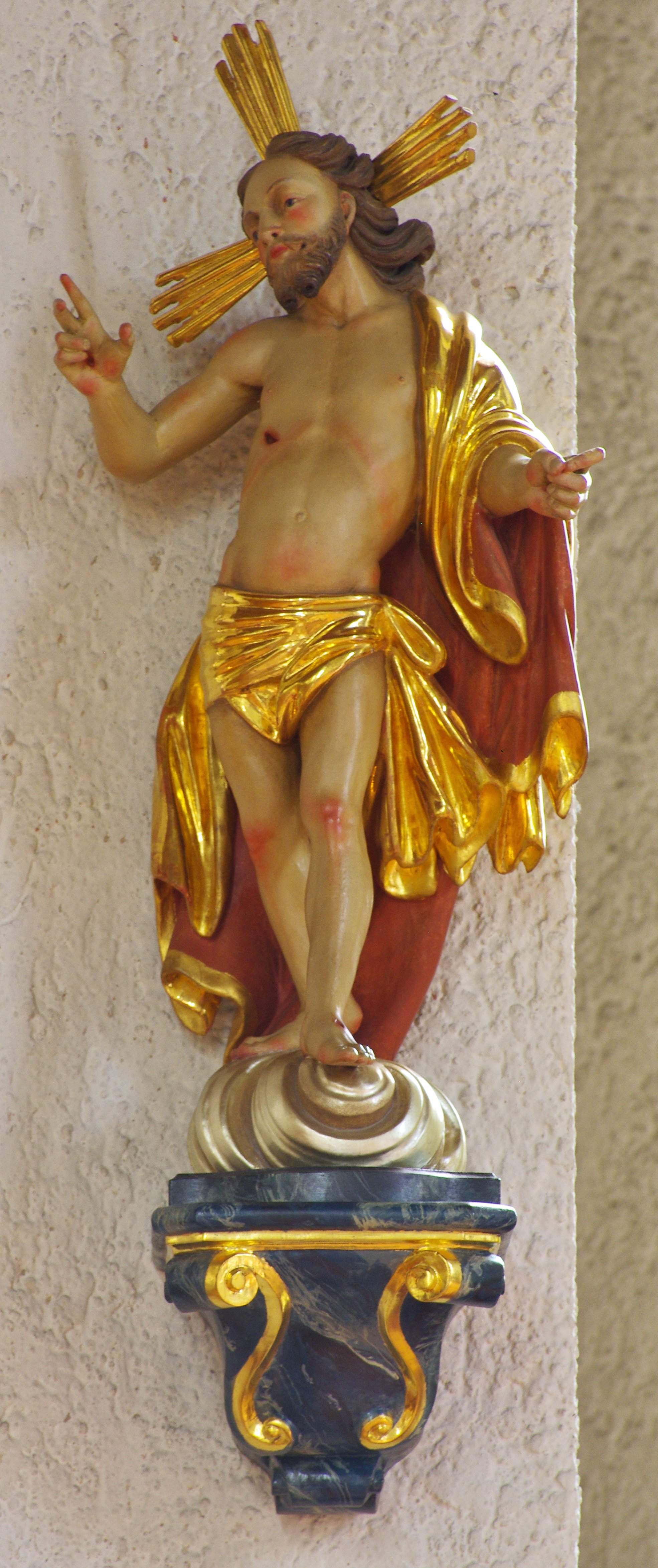 Auferstandener Jesus Christus (von Adam Winterhalder) in der Pfarrkirche St. Martin in Vöhrenbach